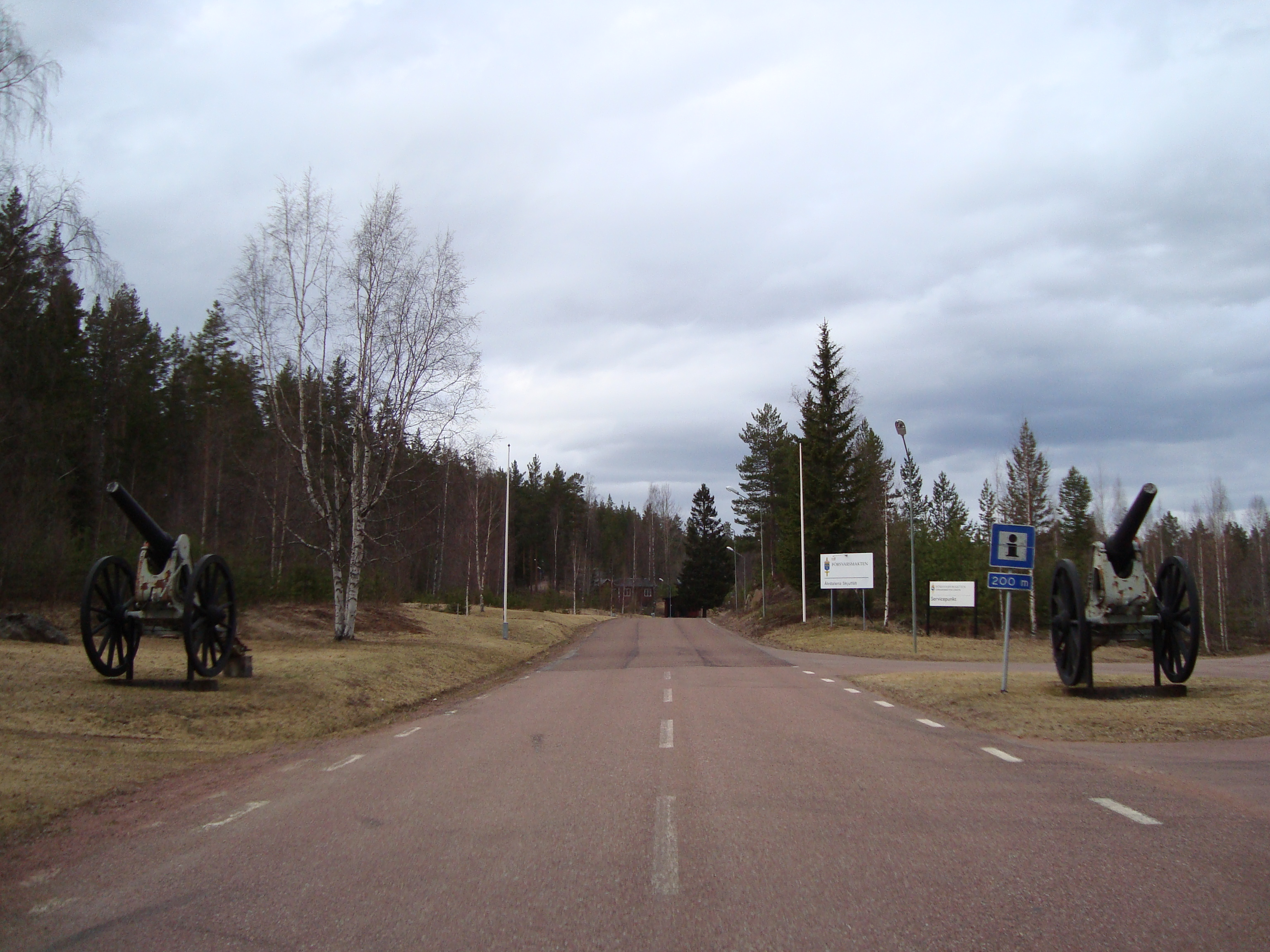 Kanoner vid infarten till Älvdalens skjutfält, Trängslet, Älvdalens kommun, Sverige